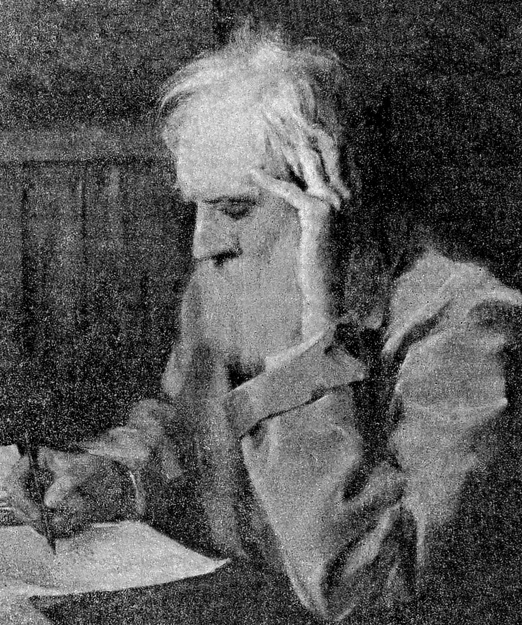 Edward Ballard